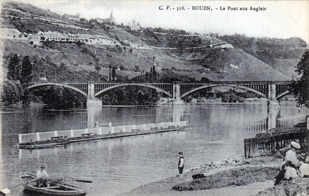 Carte postale ancienne de Rouen, Le Pont aux Anglais